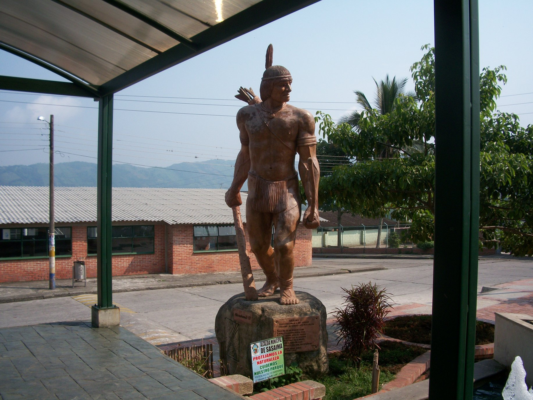 El indio Cacaima fue un gran cacique que comandaba los territorios de la zona occidental de Cundinamarca. De este Indio proviene el nombre del municipo (Sasaima) ubicado en la Provincia de Gualiva a 80km de la capital Colombiana